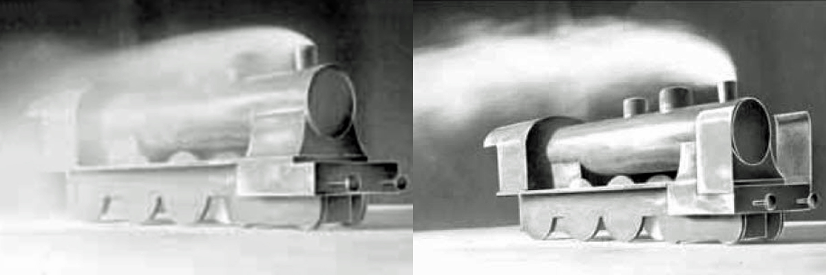 Dampflokomotive ohne und mit Windleitblechen